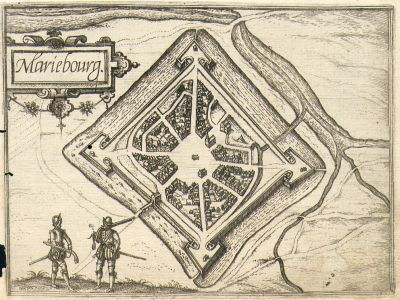 carte du fort de Mariembourg, construit par marie de hongrie